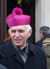 Biskup diecezji zamojsko-lubaczowskiej - ks. Wacław Depo